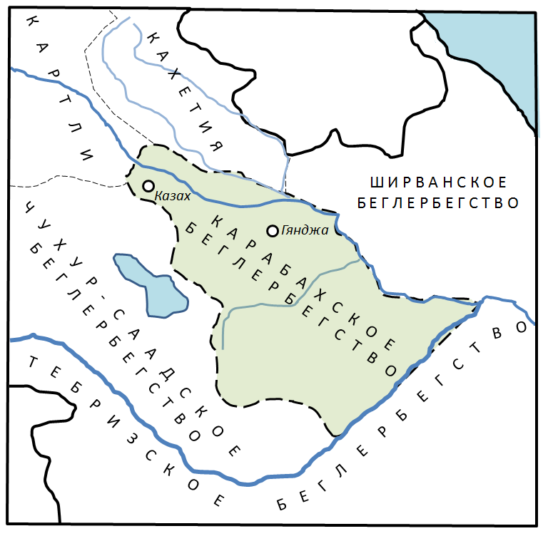 Карта Карабахского беглербегства в XVI - первой половине XVII в. Построена на основе карты "Кавказ в XVI - первой половине XVII в." из "Всемирная истории" (глава XXIII. Народы Кавказа и Средней Азии в XVI и первой половине XVII в. 1. Кавказ), Том 4-й, (1958 год).